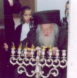 רבי ירחמיאל צבי רבינוביץ, האדמו"ר מביאלה-פשיסחא